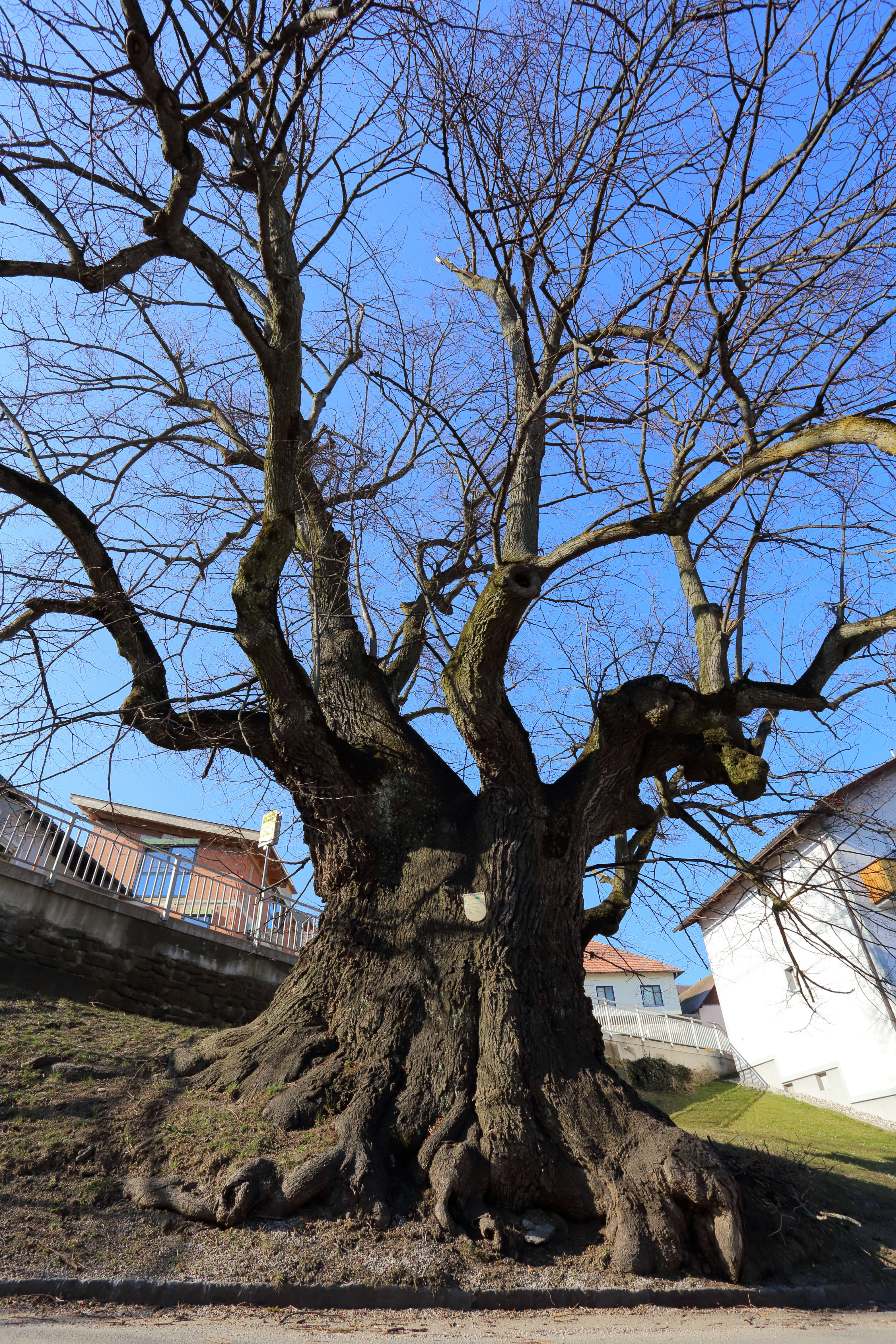 Die unter Naturschutz stehende Sommerlinde in Hochneukirchen, ein Ortsteil der niederösterreichischen Marktgemeinde Hochneukirchen-Gschaidt. Der mächtige Baum befindet sich im Ortszentrum, ist rund 650 bis 700 Jahre alt und somit in etwa so alt wie der Ort selbst. This media shows the natural monument in Lower Austria with the ID WB-032.